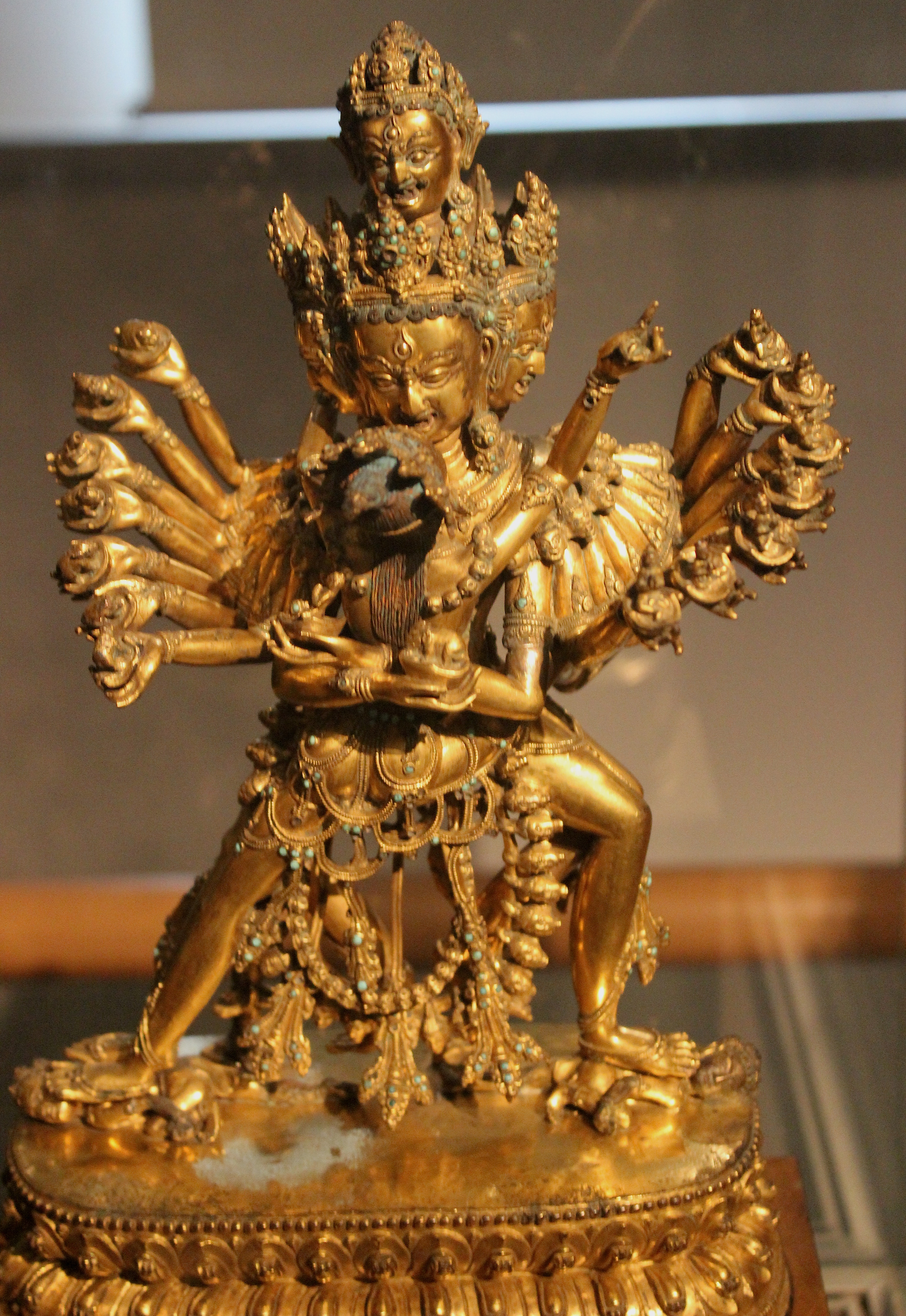 París, Musée Guimet. Havajra y Nairatmya. Arte tibetano.